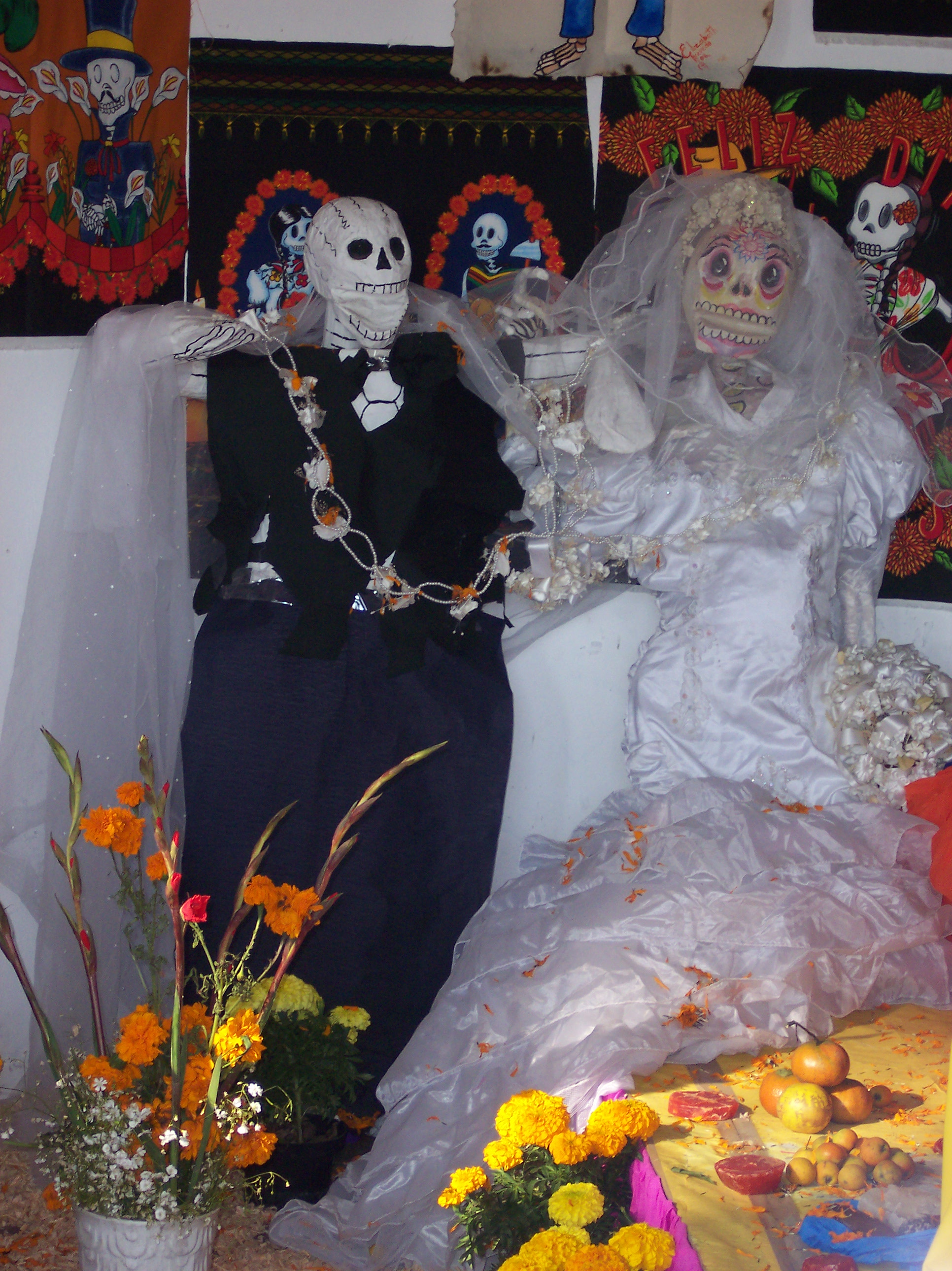 Detalle de la ofrenda hecha por empleados de la Delegación Xochimilco, D.F. México. Photo taken in Xochimilco, D. F. Mexico. November the 2nd, Day of Deads, a tradicional celebration in Mexico. SPANISH: Fotos tomadas en Xochimilco con motivo del día de muertos (2 de Noviembre) año 2006.